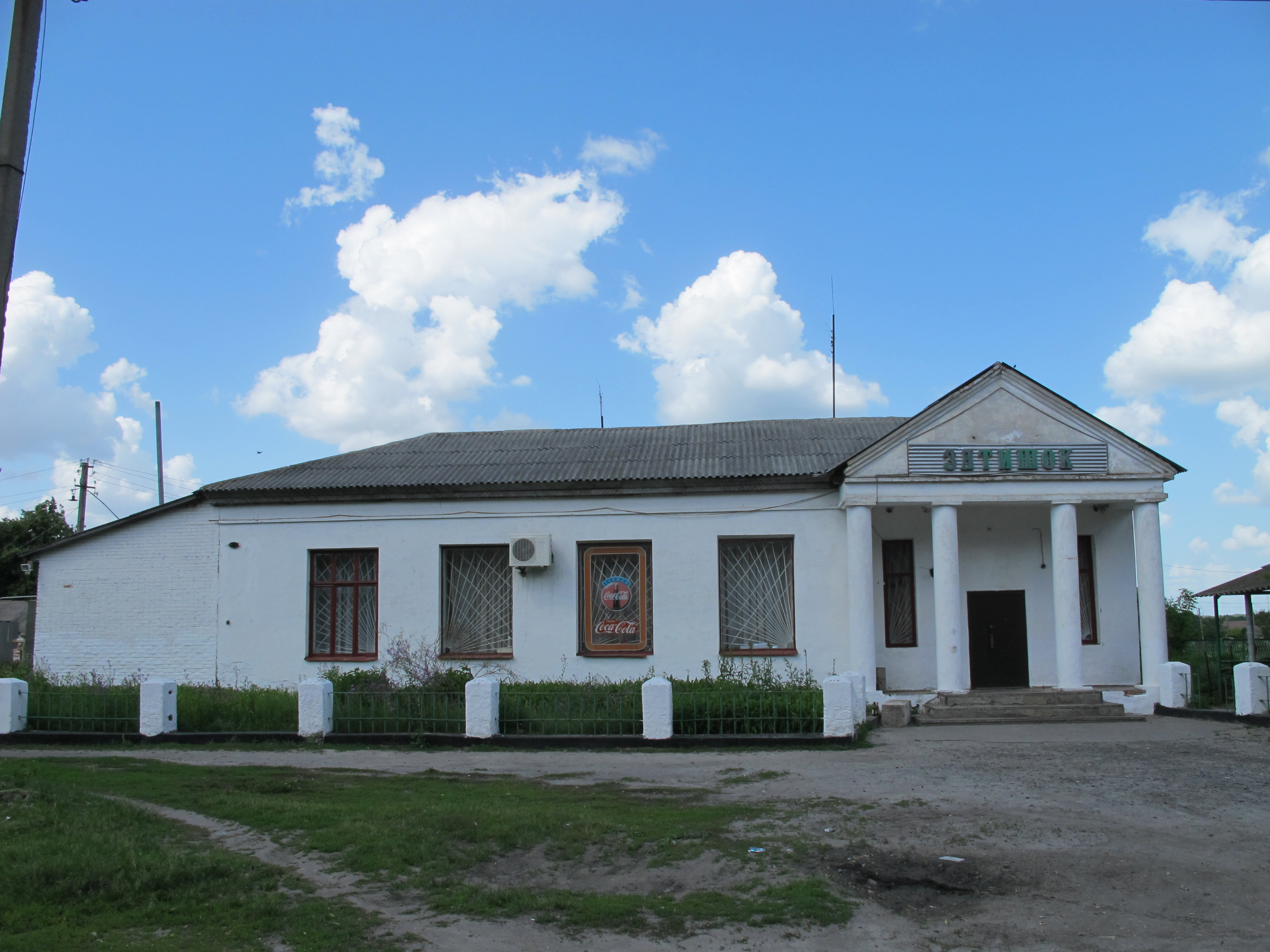 Магазин «Затишок» в посёлке Пески Лохвицкого района